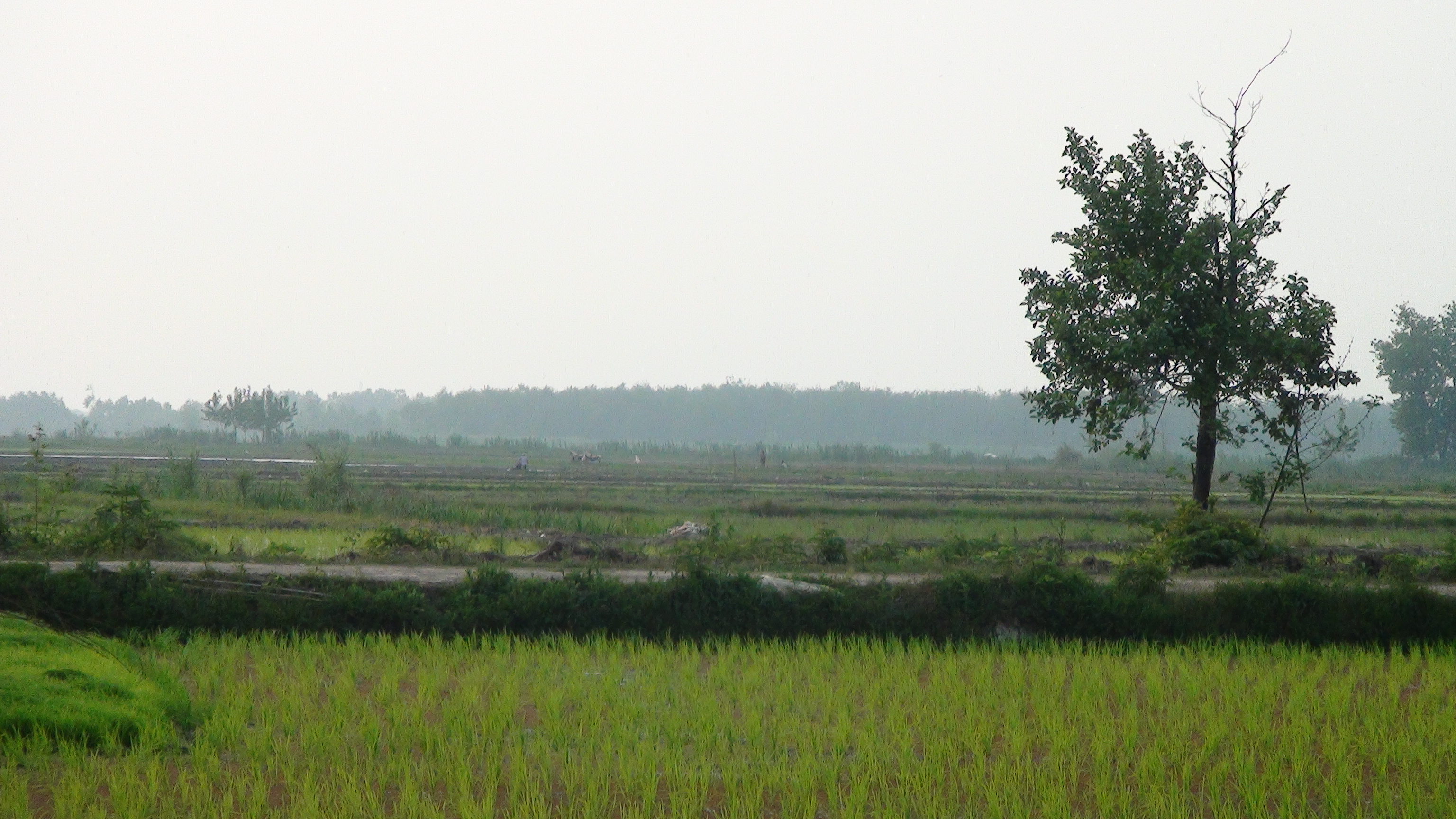 طبیعت بهاری روستای کچلام